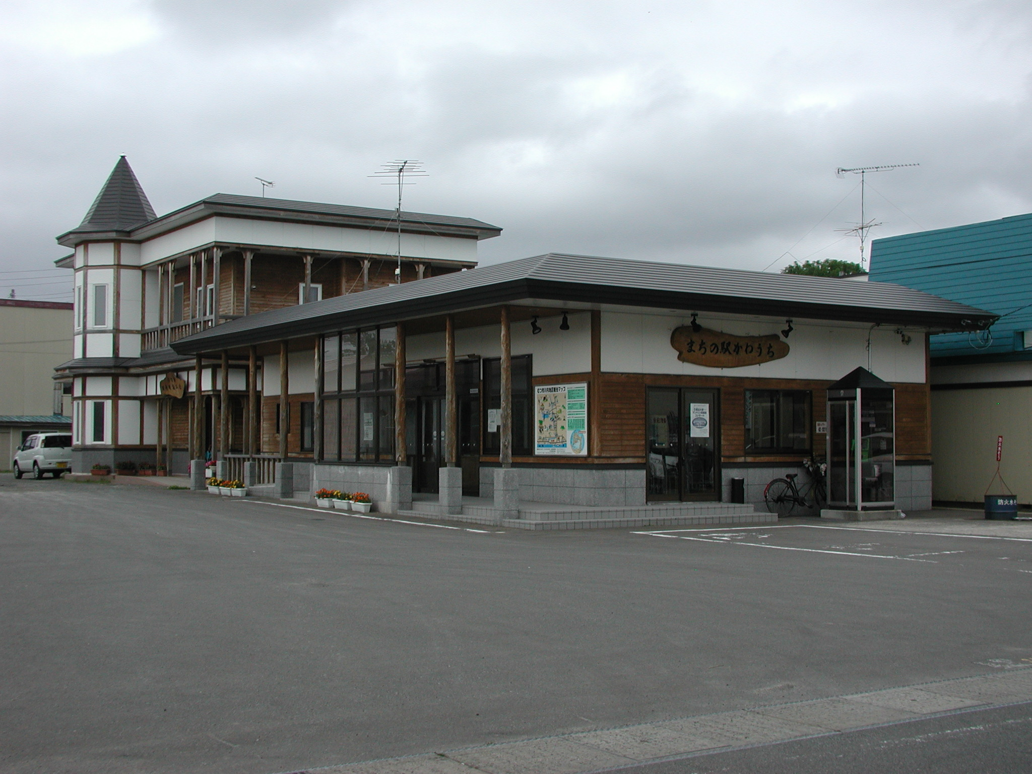 まちの駅 かわうち（JRバス下北本線・川内交通のバス乗り場も兼ねる）